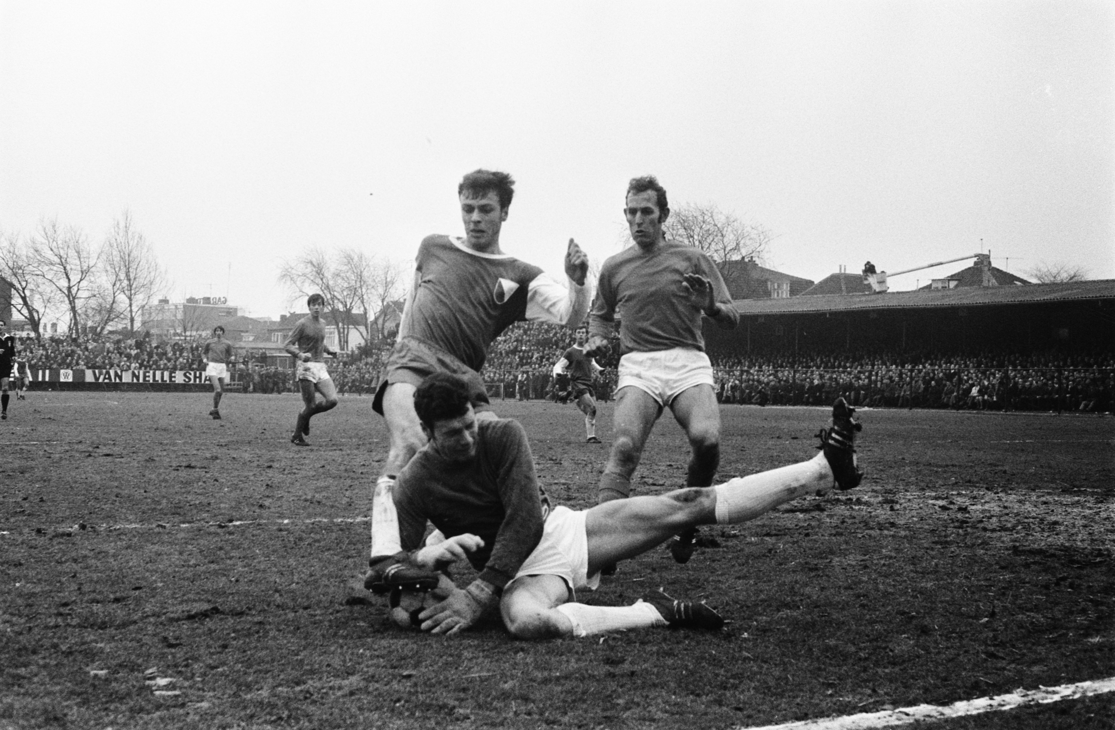 Collectie / Archief : Fotocollectie Anefo Reportage / Serie : [ onbekend ] Beschrijving : Elinkwijk tegen Volendam 0-2.1. Nummer 18 Groenendijk, keeper de Ruiter , Karregat, nummer 20 Cote in aktie Datum : 15 maart 1970 Locatie : Noord-Holland, Volendam Trefwoorden : sport, voetbal Persoonsnaam : Cote, Groenendijk Fotograaf : Koch, Eric / Anefo Auteursrechthebbende : Nationaal Archief Materiaalsoort : Negatief (zwart/wit) Nummer archiefinventaris : bekijk toegang 2.24.01.05 Bestanddeelnummer : 923-3490